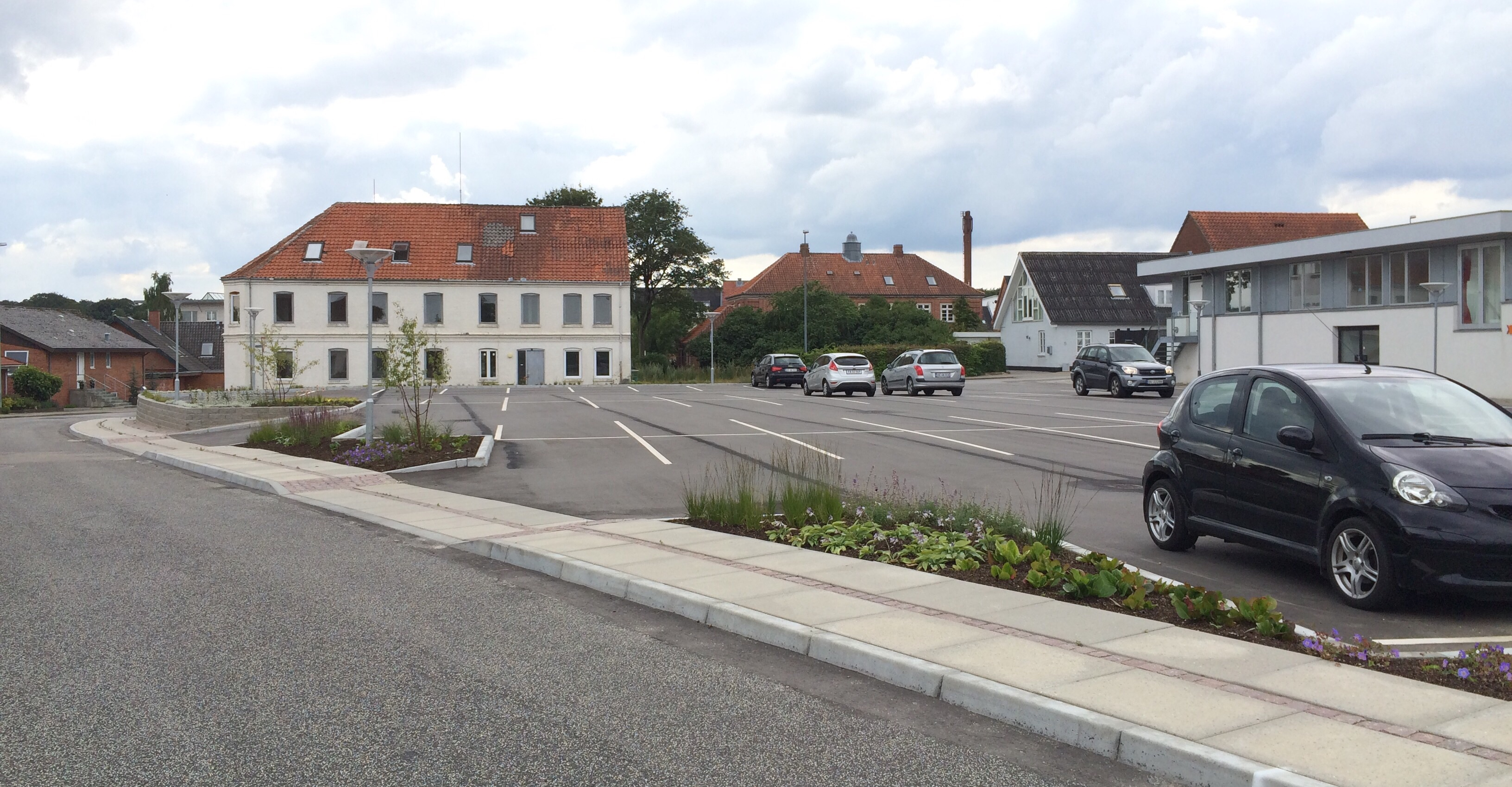 Parkeringspladserne ved Kulturcenteret.